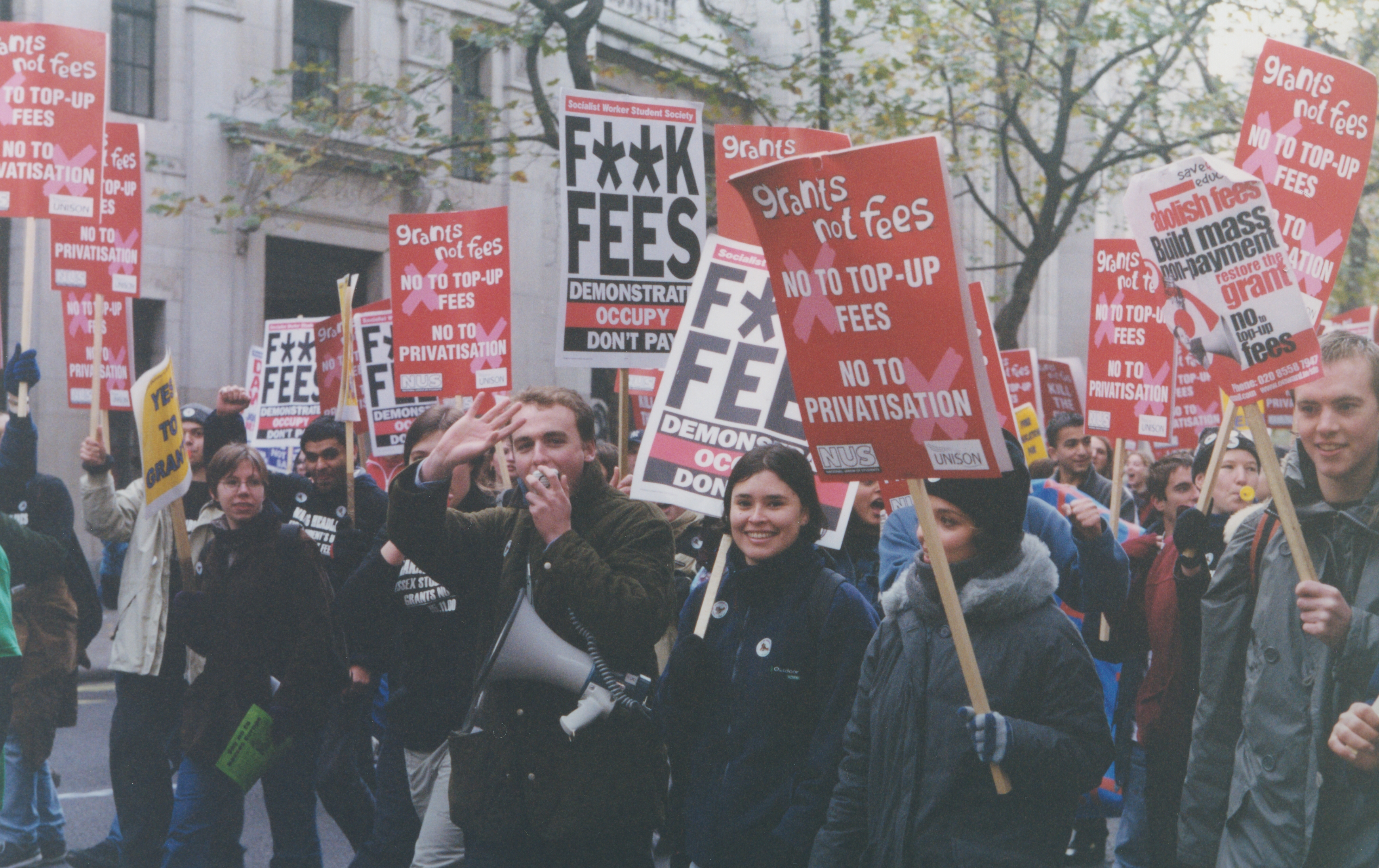 IMAGELIBRARY/824 Persistent URL